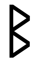 runic letter berkanan